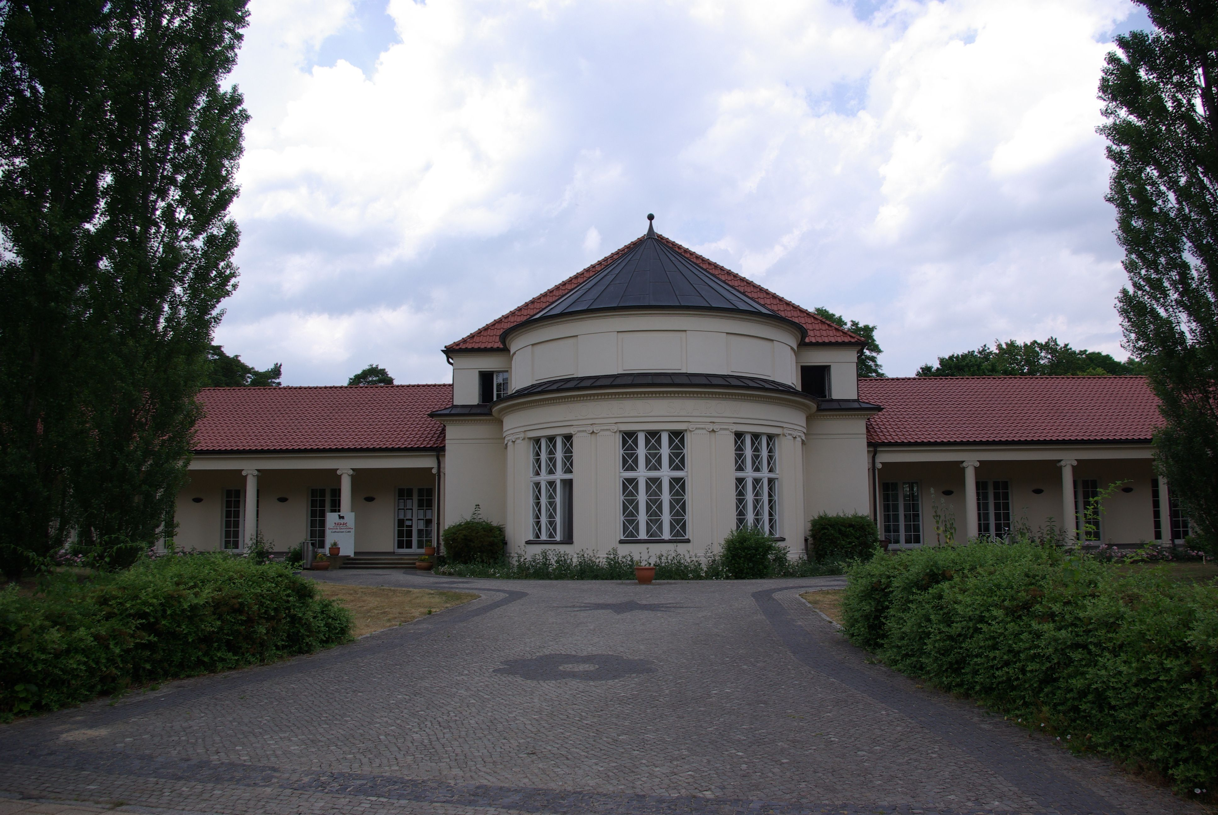 Bad Saarow in Brandenburg. Das Moorbad in der Ulmenstraße steht unter Denkmalschutz.